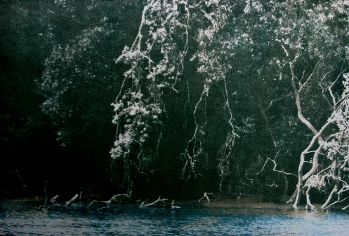 Il s'agit d'un tirage unique 31X47 cm sur papier Vinci à partir d'un négatif numérique et par contact, d'une gomme bichromatée faisant partie d'une série "les bords du Cher"